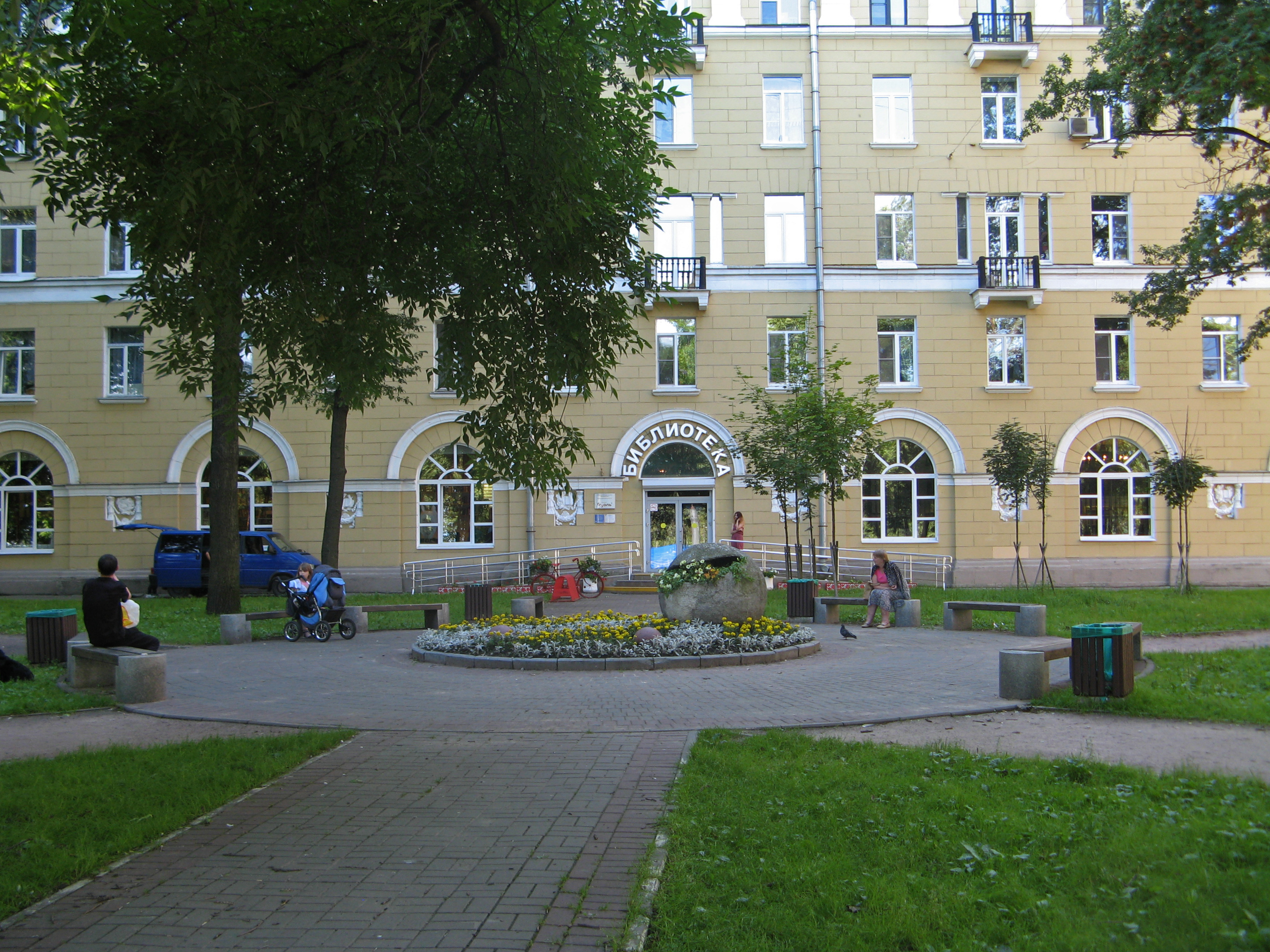 Санкт-Петербург, Среднеохтинский проспект, дом 8, библиотека им. Гоголя